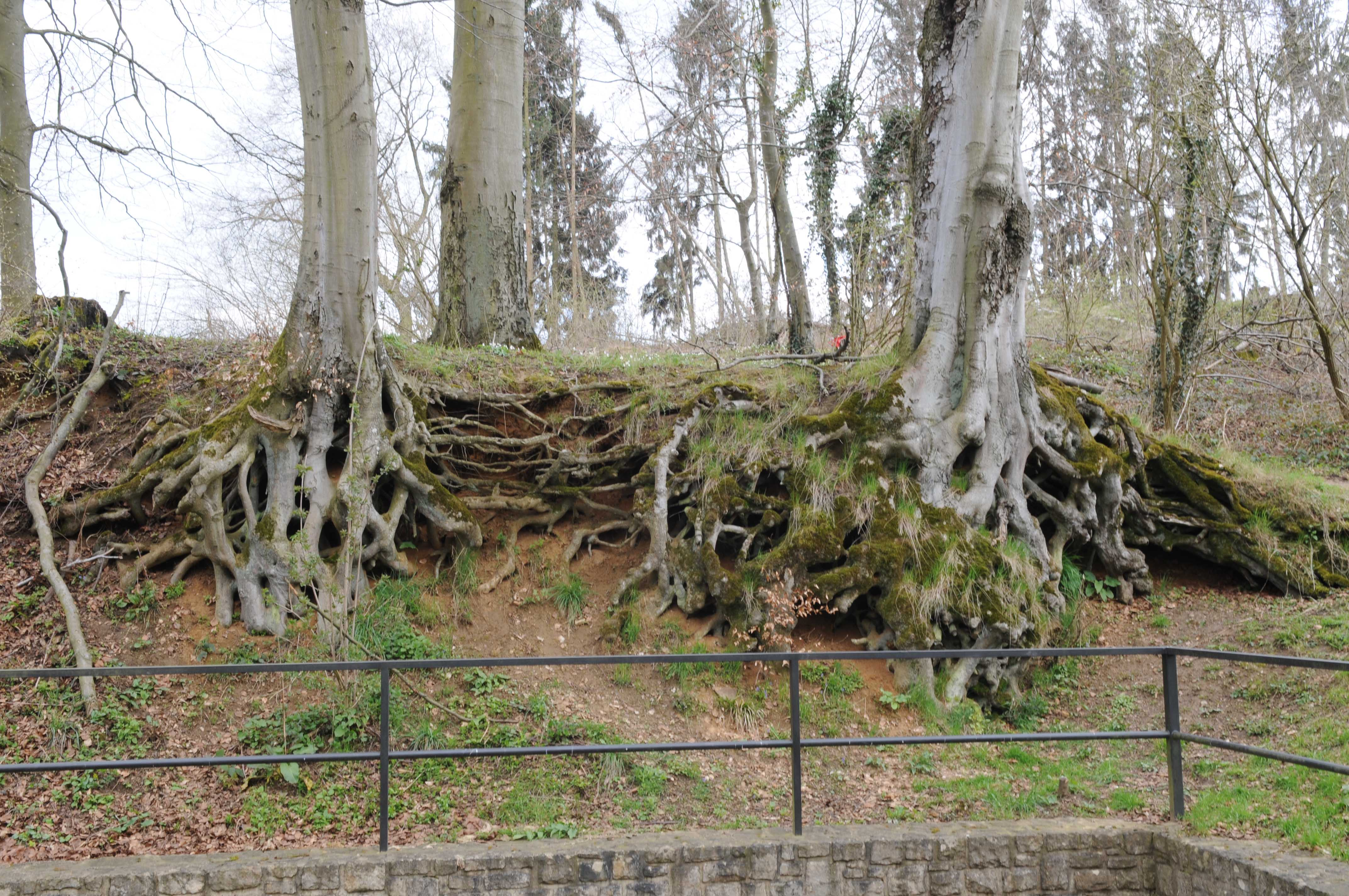 Kéibuer zu Hesper.